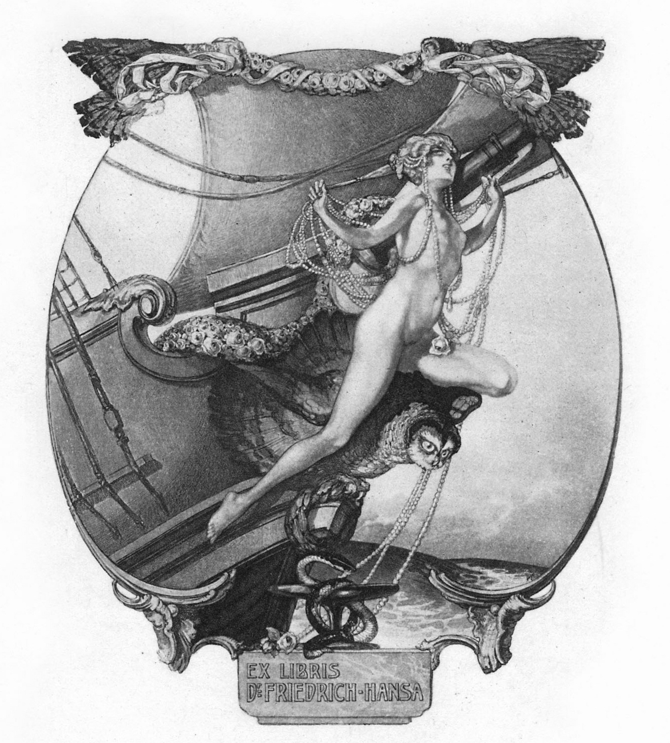 Ex-libris Friedrich Hansa